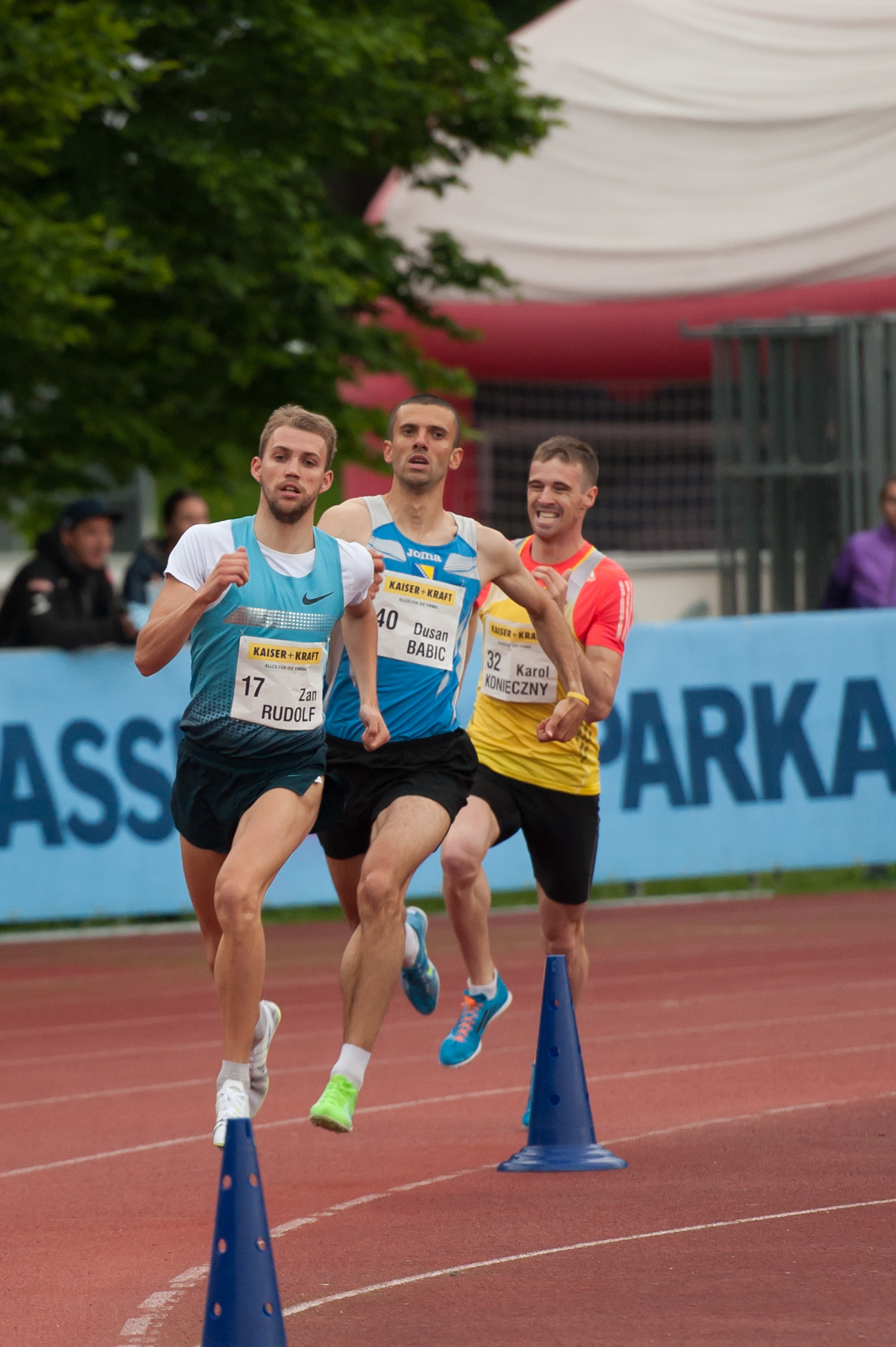 Salzburger Leichtathletik Gala am 27. Mai 2015: Zan Rudolf